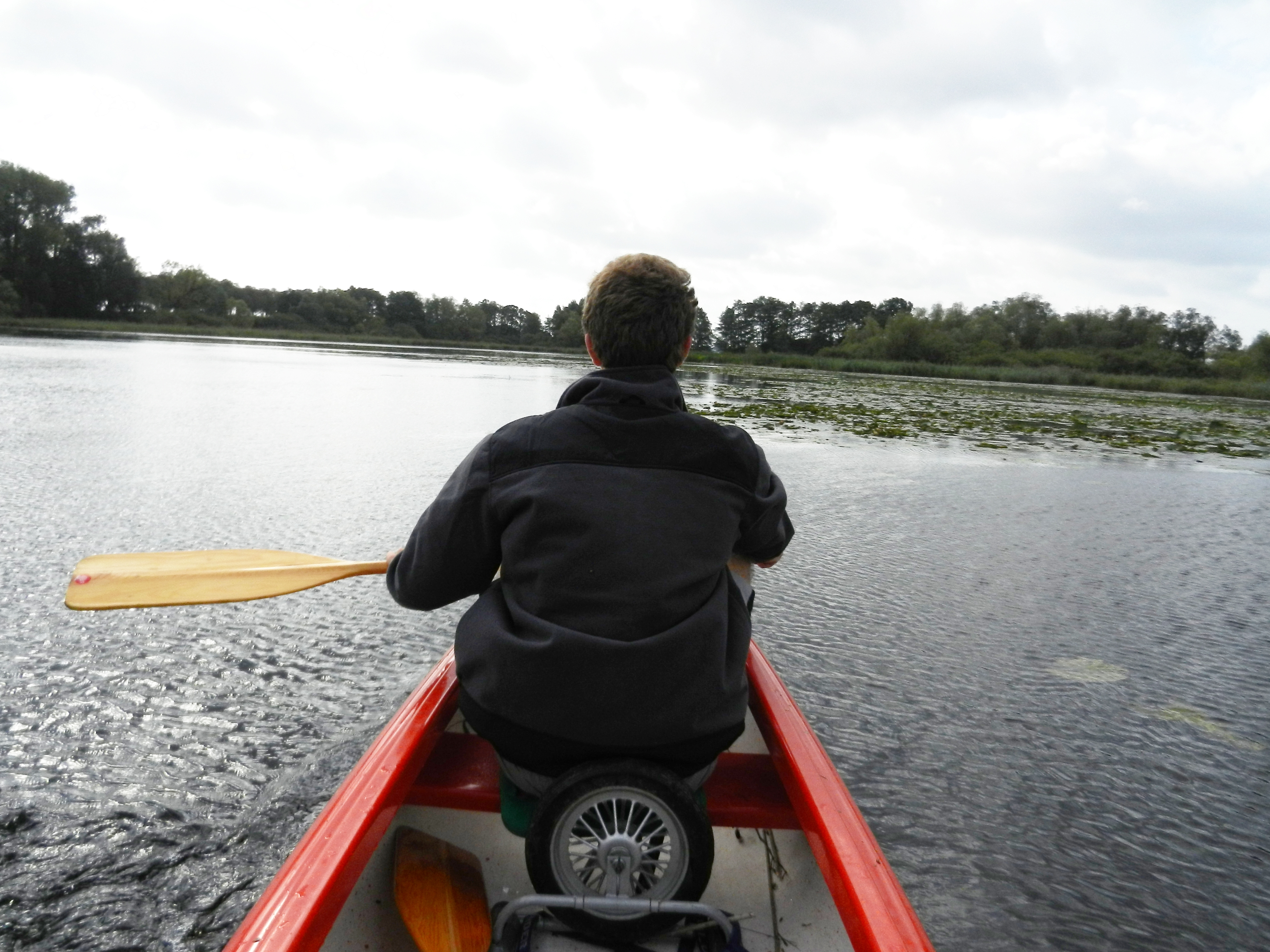 Barnerstücker See Richtung Süden gesehen. Aubachdurchfluß